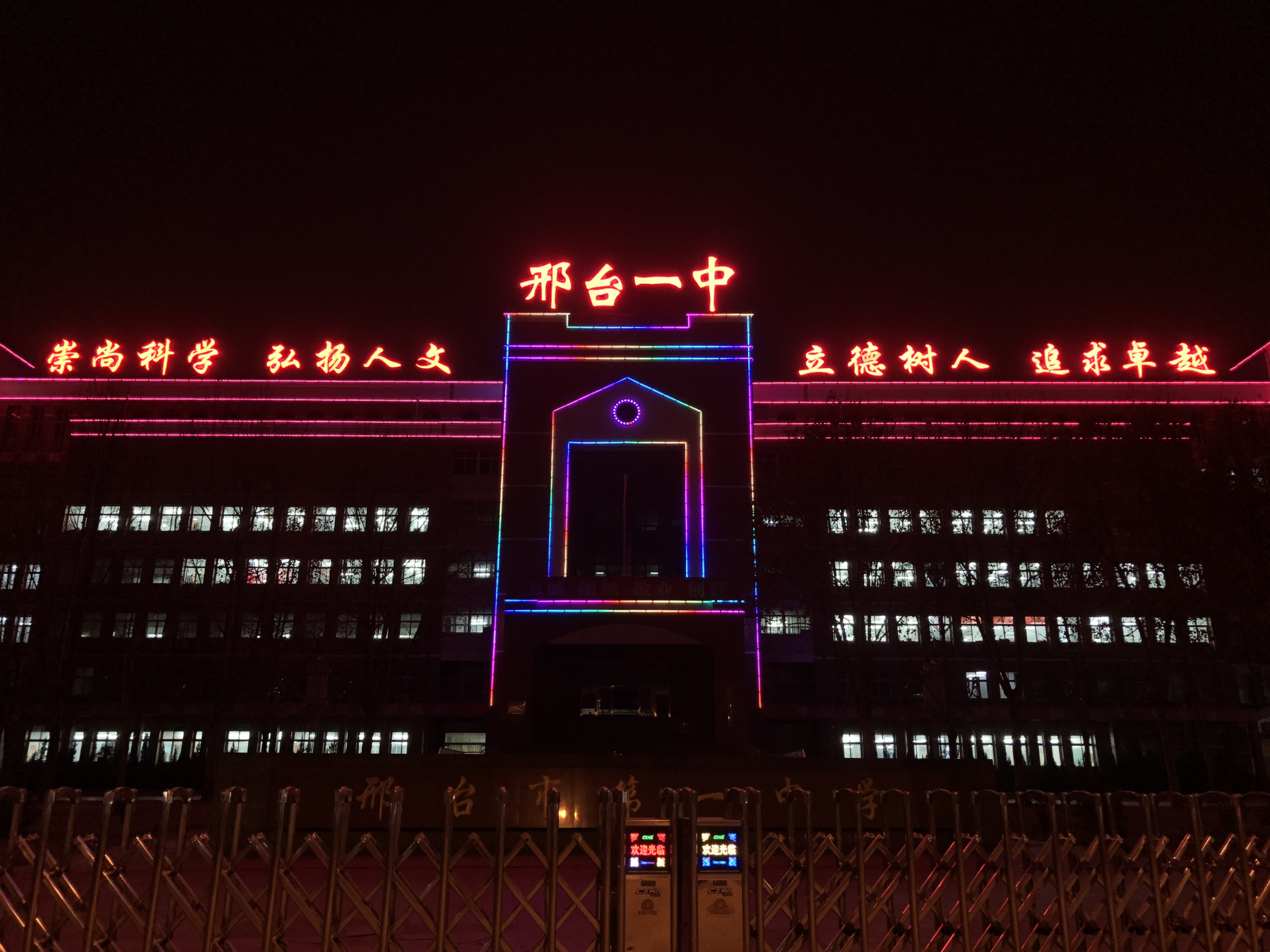 中文（中国大陆）: 在邢台一中拍摄